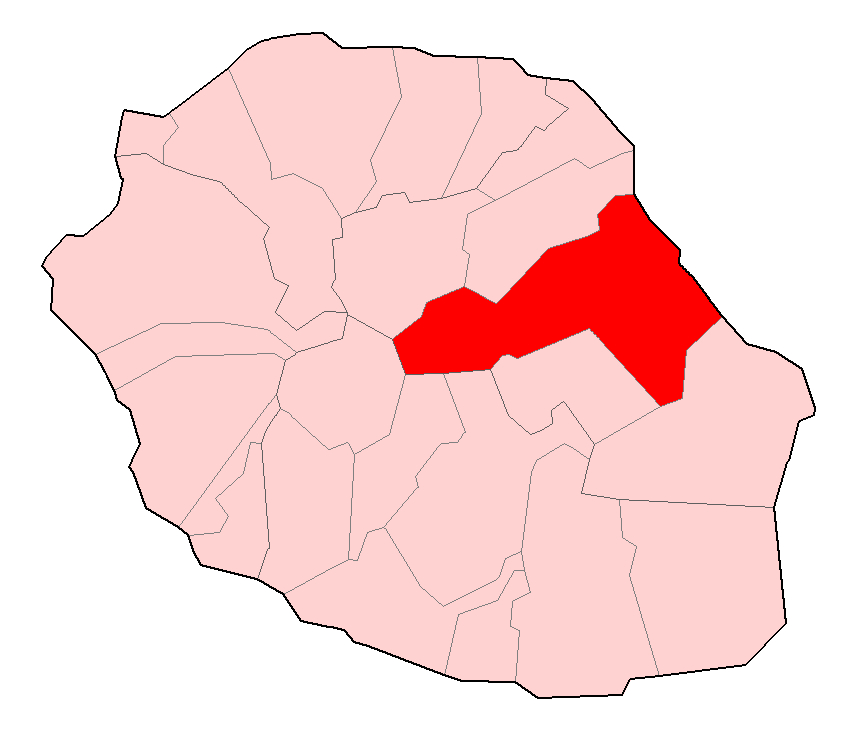 Carte de la Réunion permettant de localiser Saint-Benoît.